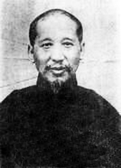 李經羲（1859年－1925年）